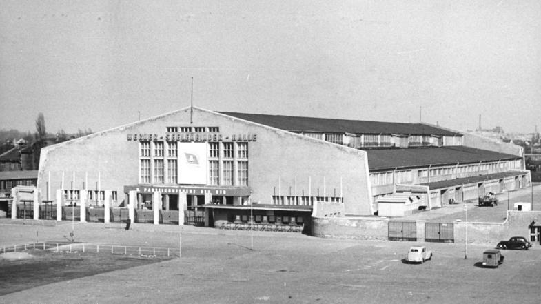 Berlin, Werner-Seelenbinder-Halle Zentralbild Quasch. 20.3.1956 Die Werner-Seelenbinder-Halle in Berlin Tagungsort der 3. Parteikonferenz der Sozialistischen Einheitspartei Deutschlands. (24. - 29.3.1956)